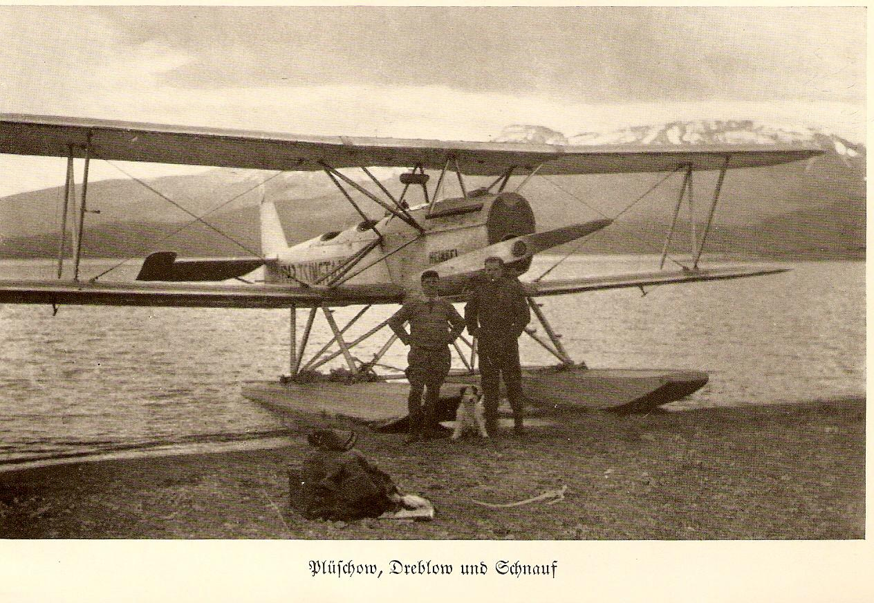 Gunther Plüschow (1886-1931), German aviator, Dreblow and "Schnauf"